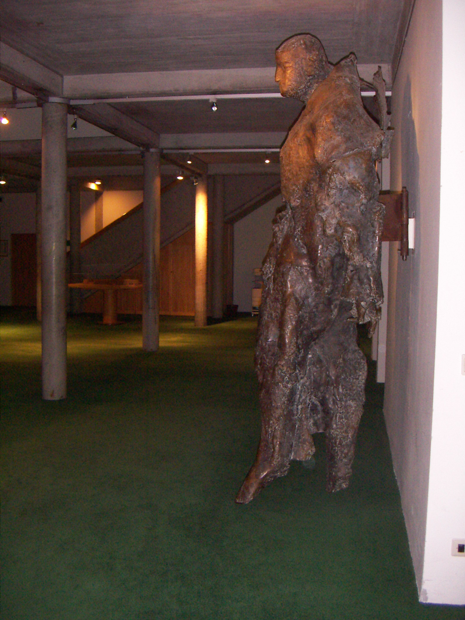 Darstellung des heiligen Virgil, Plastik des Bildhauers Josef Zenzmaier im Bildungshaus Salzburg St. Virgil